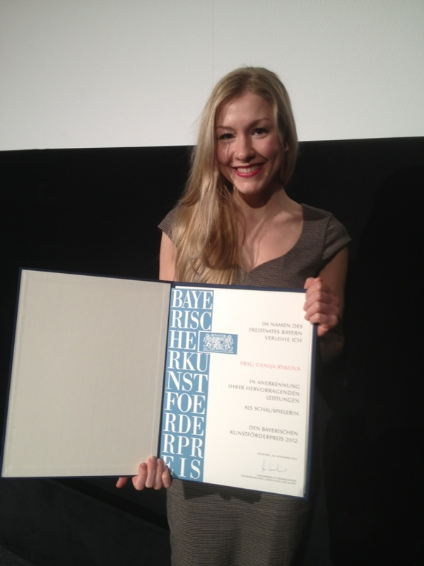 bei der Verleihung des Bayerischen Kunstförderpreises 2012